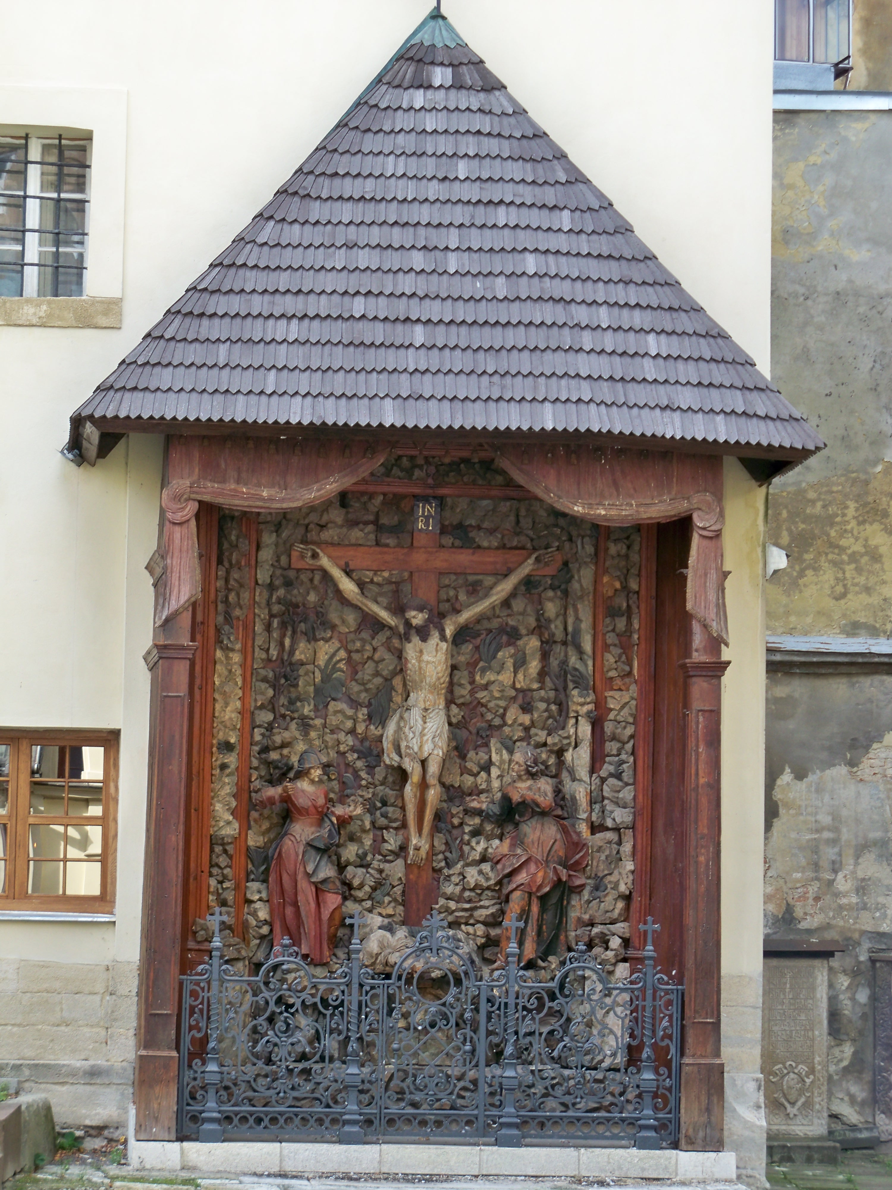 Вірменський собор - вівтар "Голгофа", Львів, Вірменська, 7/9